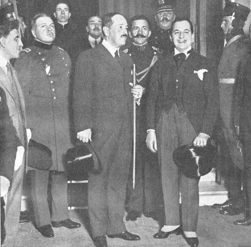 El coronel Mosconi (izq) junto al ministro de Relaciones Exteriores de Chile, doctor Jorge Matte Gormaz.